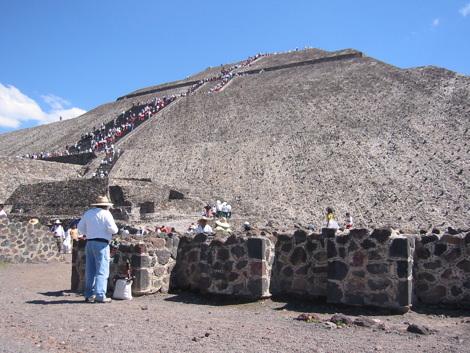 Teotiŭakano.